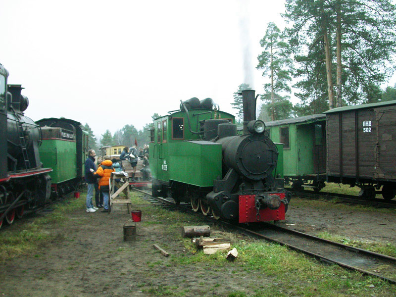 Переславский железнодорожный музей